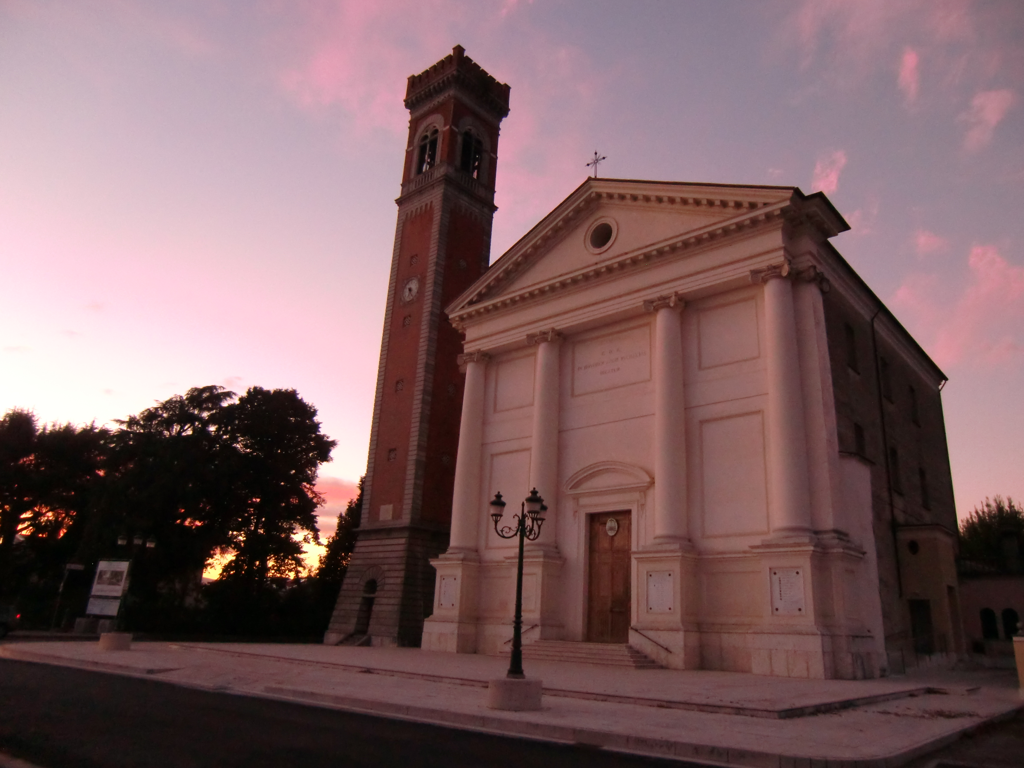 Facciata